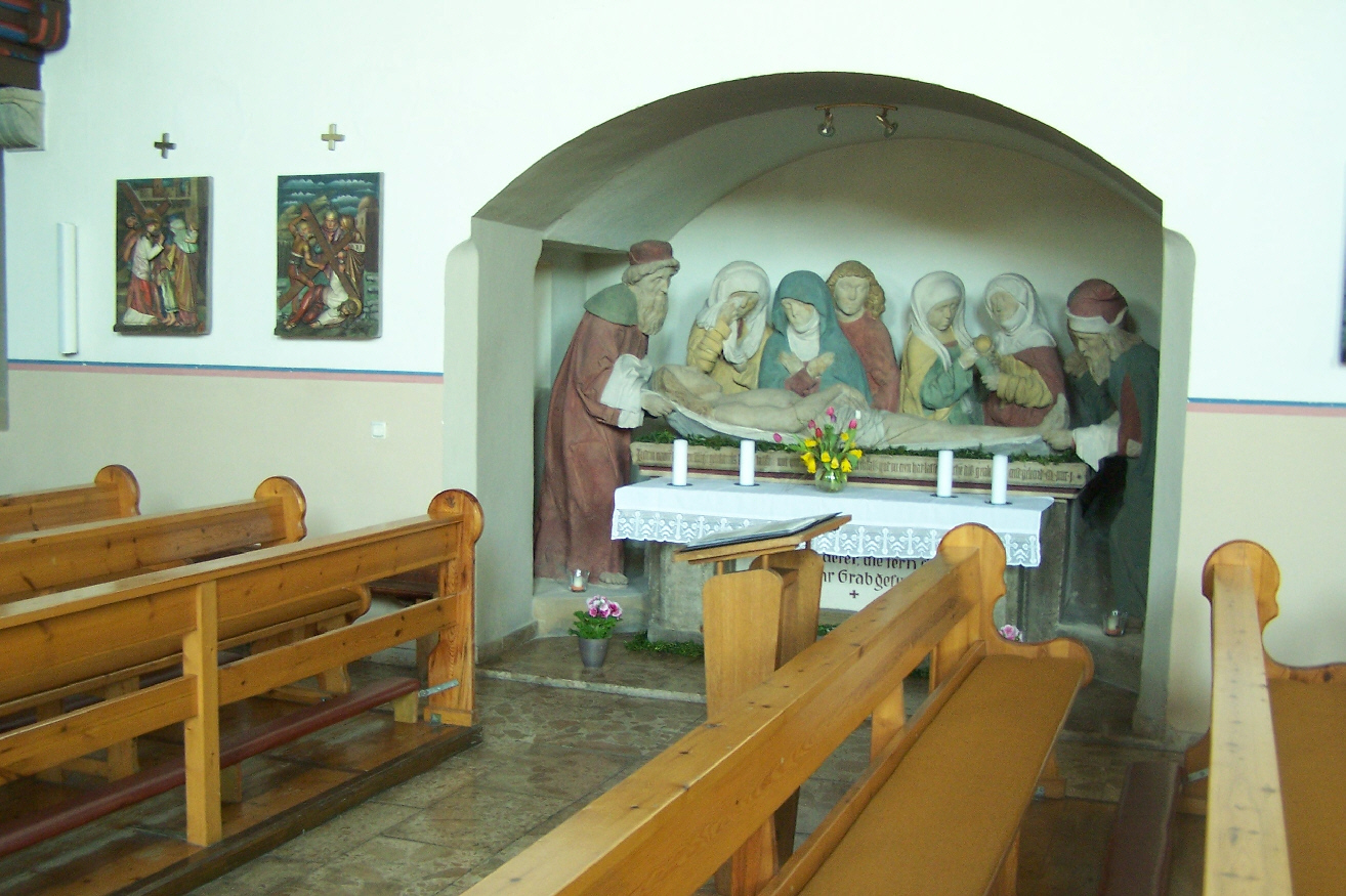 Das Heilige Grab in der Kirche von Diedorf im Obereichsfeld.